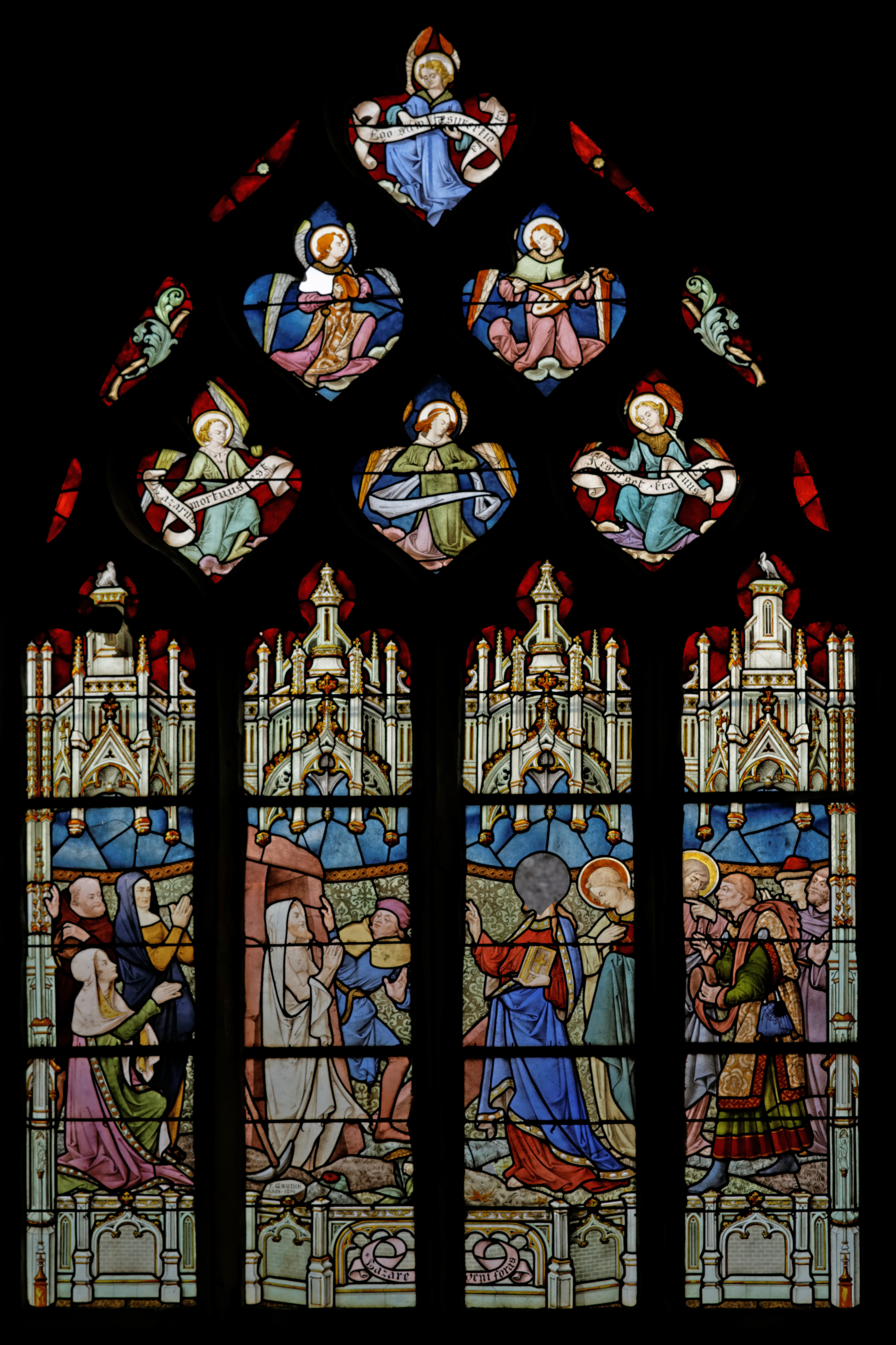 Scène de la Résurrection de Lazare sur les vitraux signés F.Gaudin, Paris, 1894, dans la cathédrale Saint-Paul-Aurélien de Saint-Pol-de-Léon.